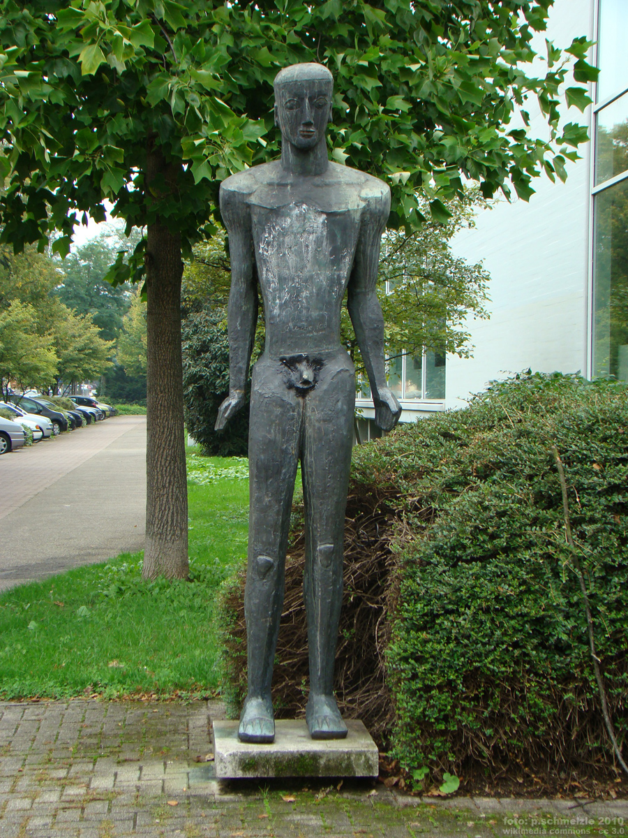 Jüngling in Heilbronn beim Theodor-Heuss-Gymnasium